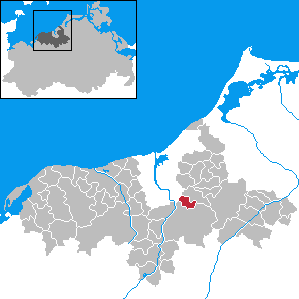 Roggentin in Mecklenburg-Western Pomerania - District Bad Doberan